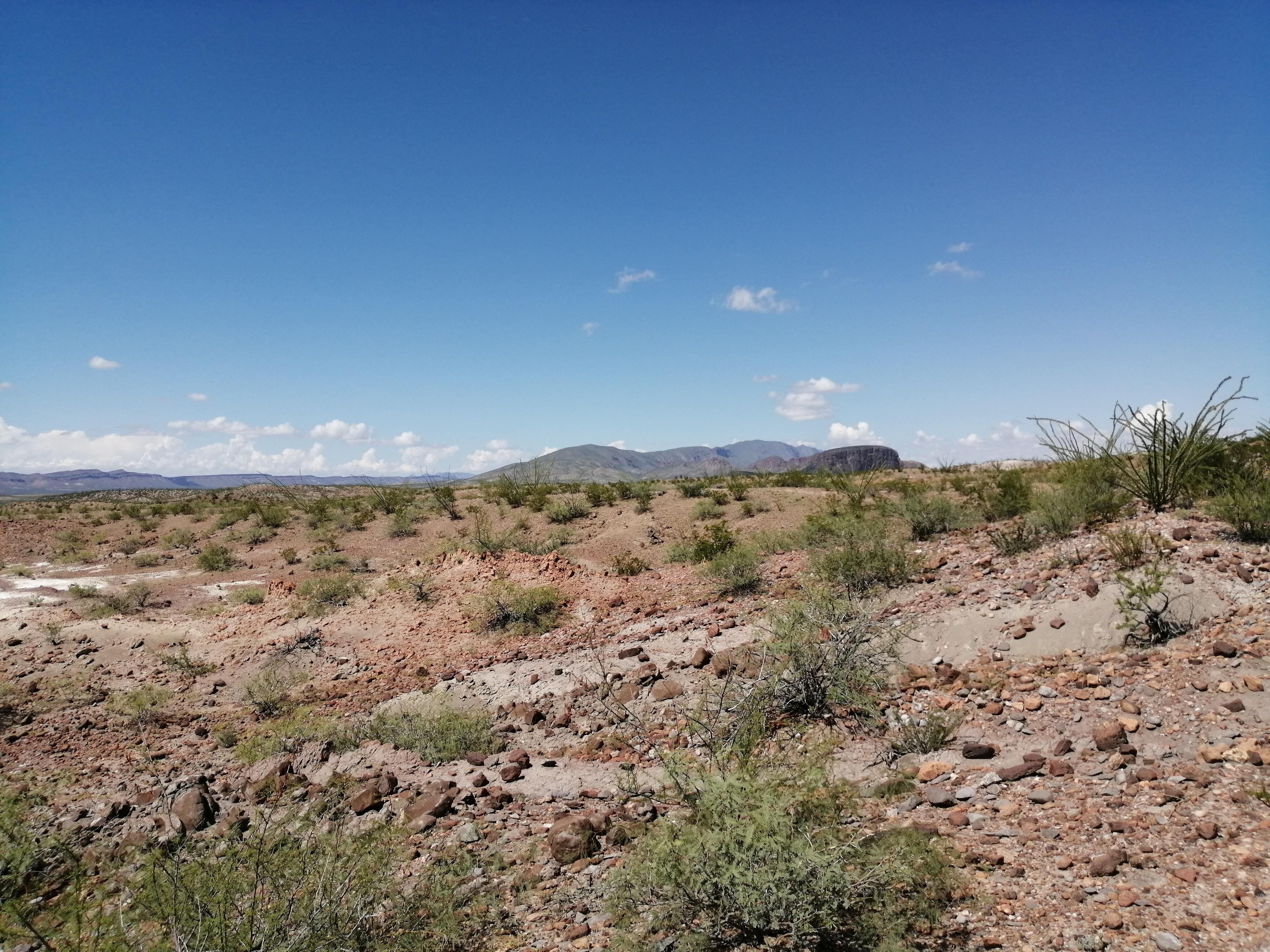 Formación San Carlos